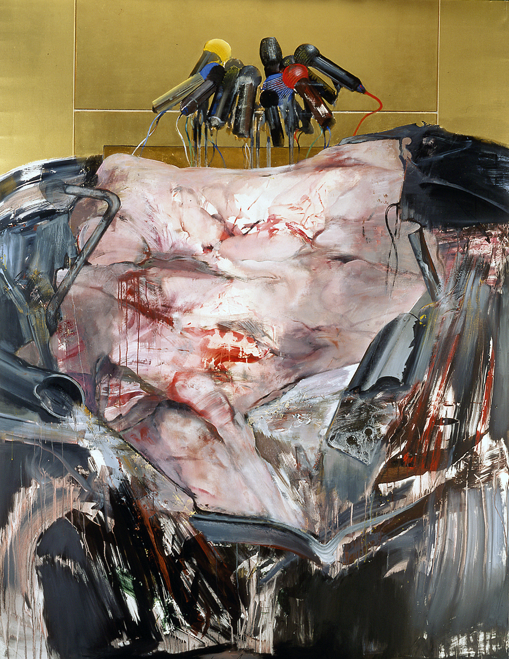 Franta, 11. září (2001), akryl na plátně 200 x 200 cm